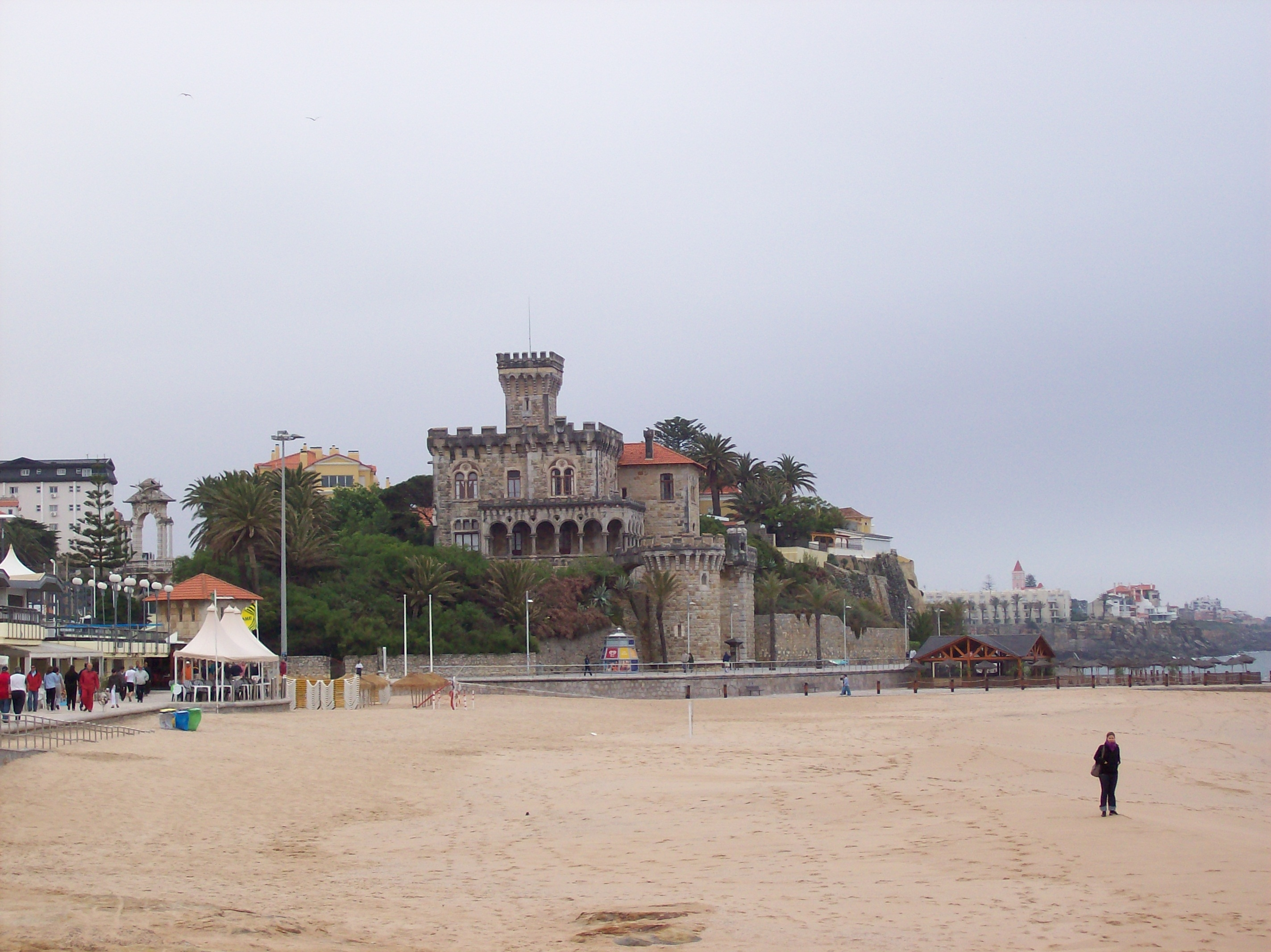 Estoril, Strand (Portugal)